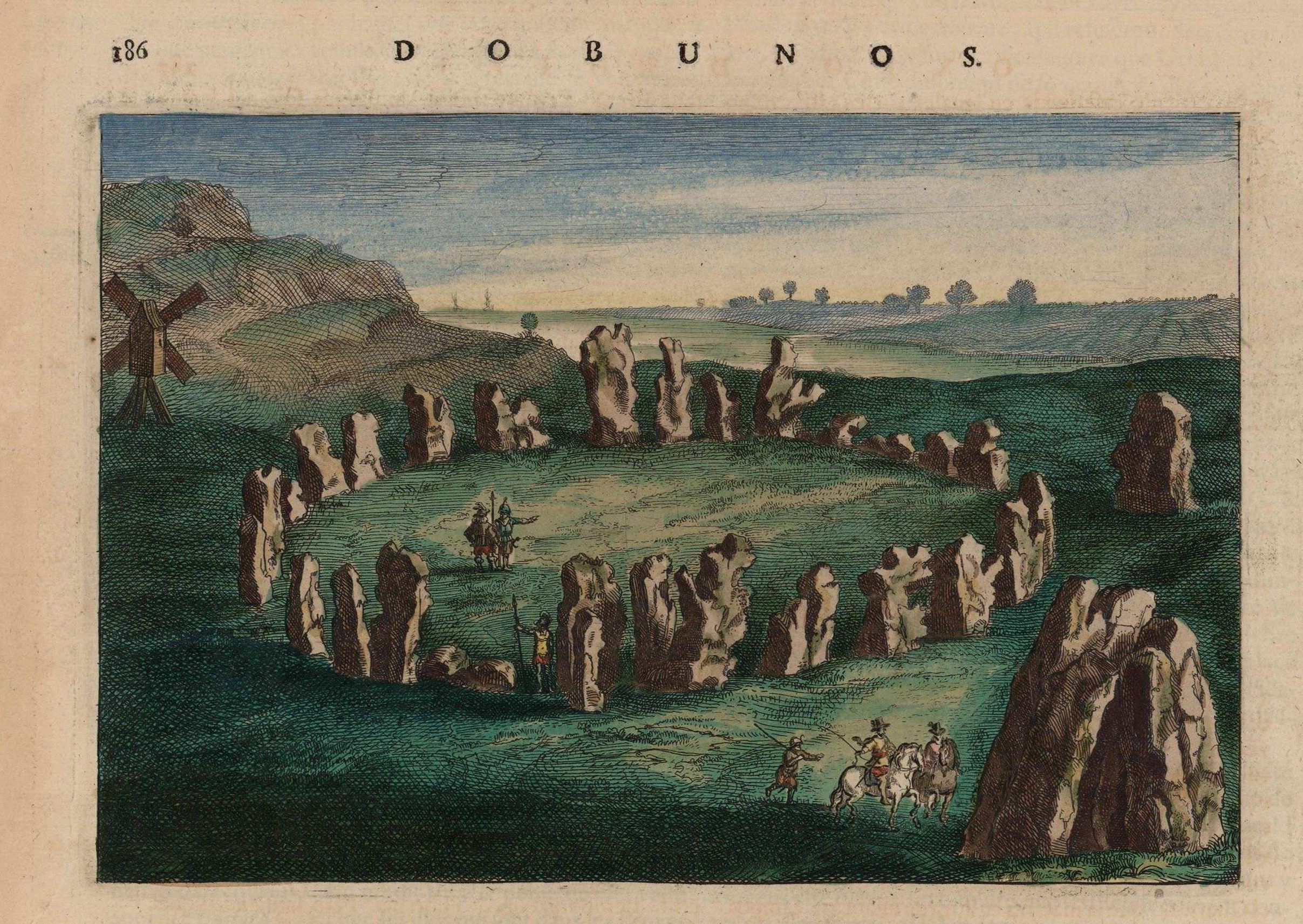 Gravure van de mannen v d koning